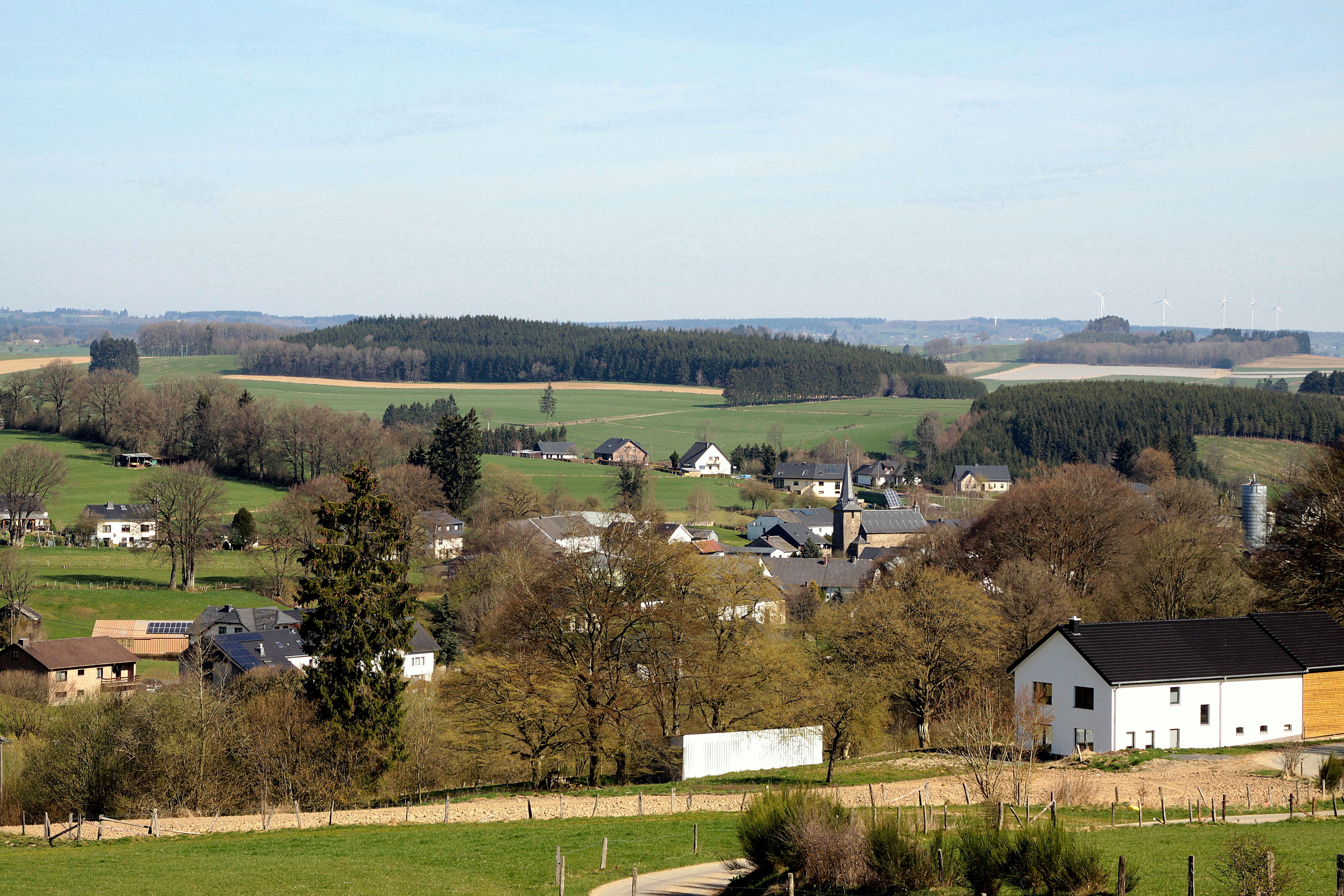 Espeler vu Süde gesinn